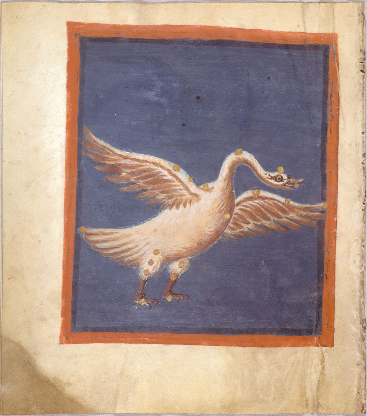 Fol. 46v Cygnus